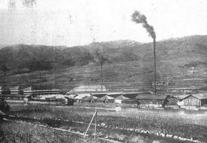 片倉組 1908